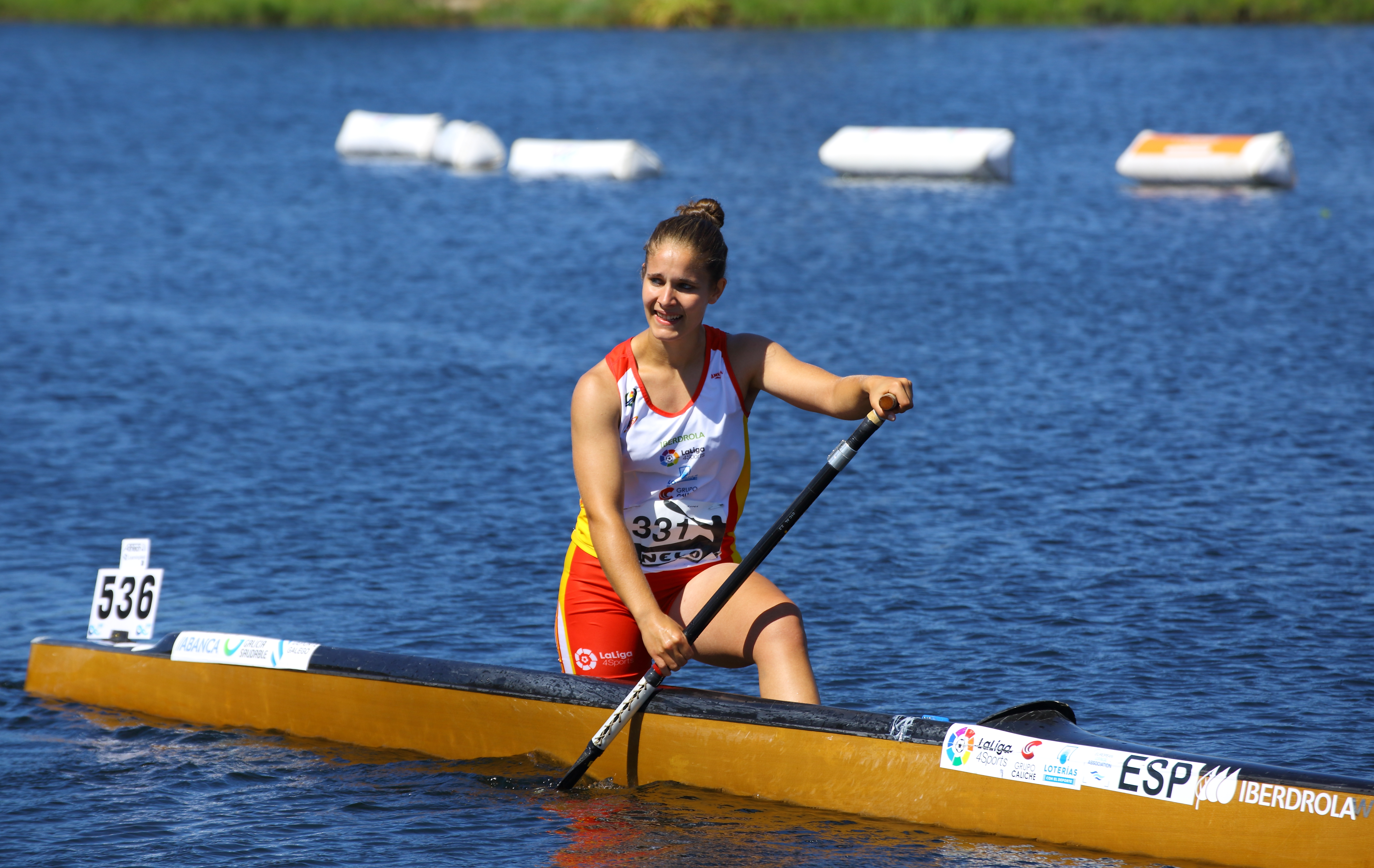 Ponte de Lima - CASAL Jenifer (ESP)